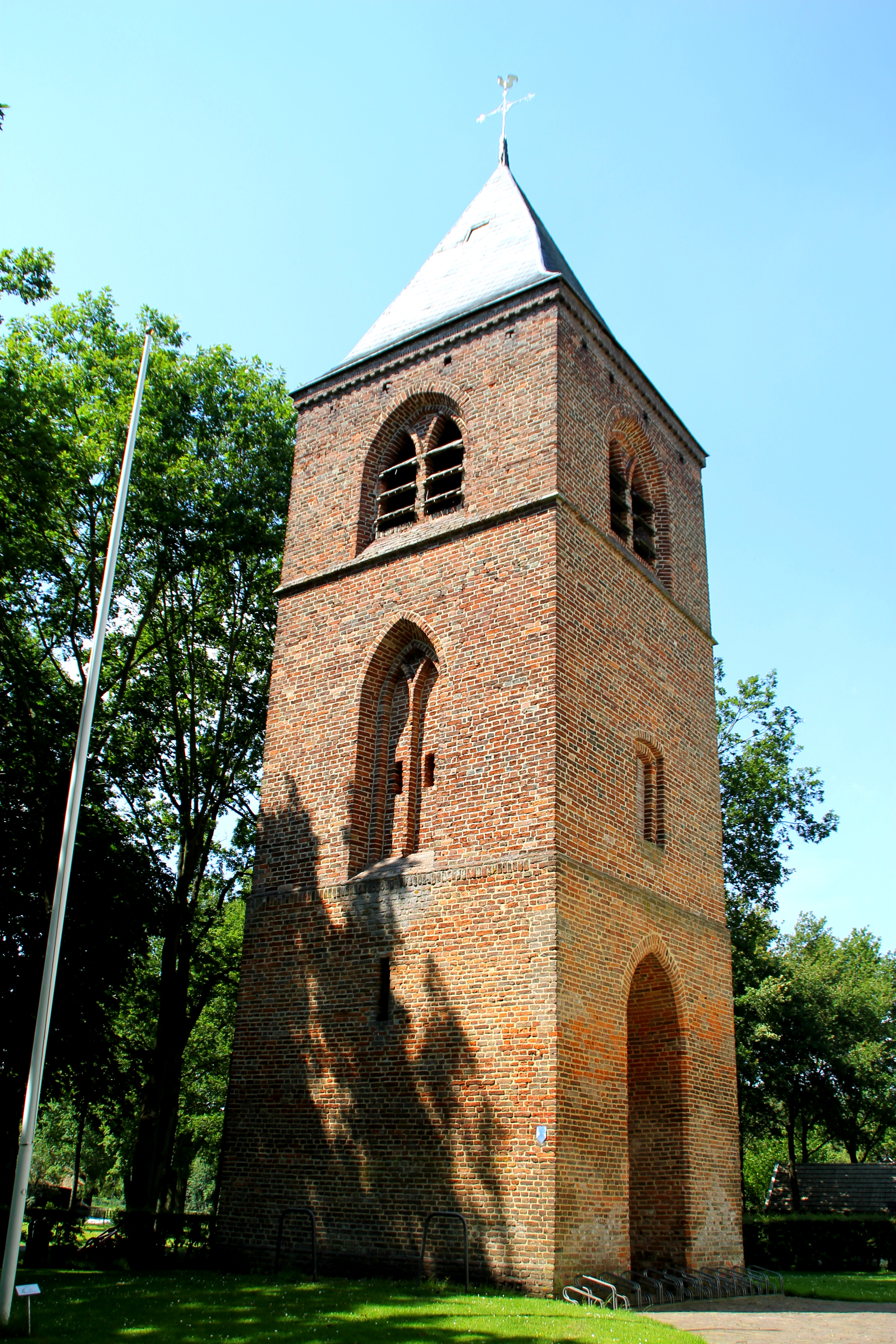 Oosterhesselen, Geserweg 2 - Protestantse Kerk